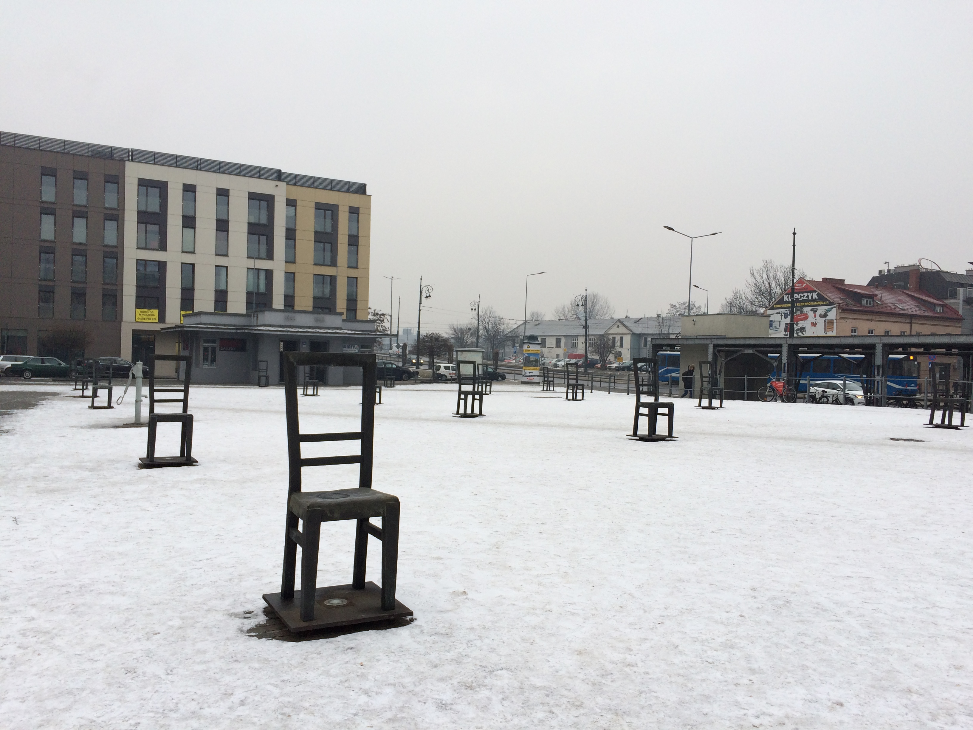 Plaza de los Héroes del Guetto en Podgorze (Cracovia).